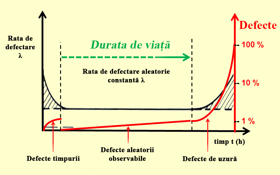 Curba cada de defectare a condensatoarelor electrolitice